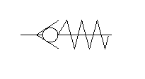 pneumatisk backventil, ritad av Max. .